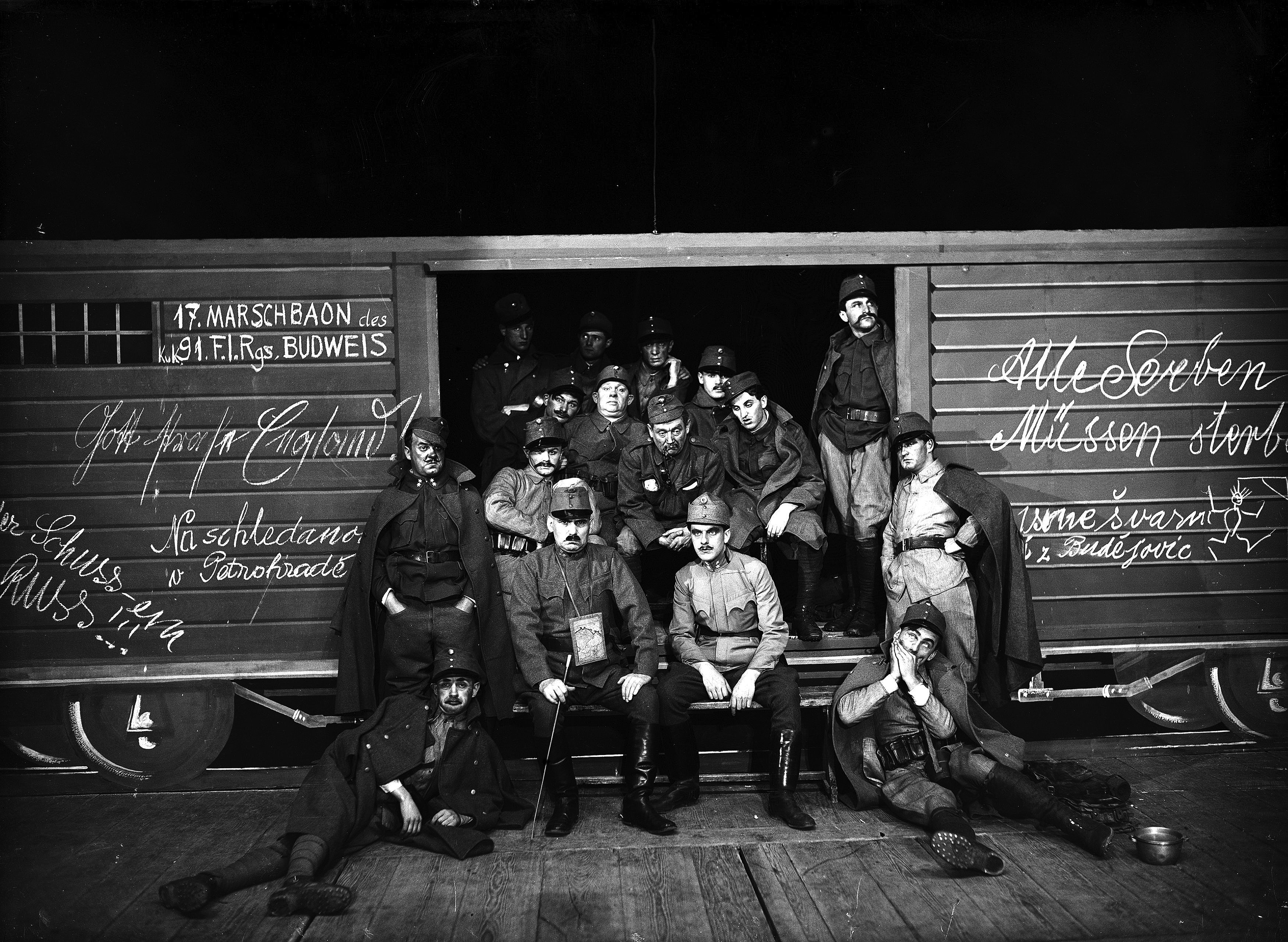 Przedstawienie „Szwejk” Jaroslava Haška w Teatrze Miejskim im. Juliusza Słowackiego w Krakowie. Widoczni m.in. Kazimierz Fabisiak jako Kapral (stoi przed wagonem z lewej), Stefan Turski jako Kapitan Sagner (siedzi w 1. rzędzie z lewej), Roman Hierowski jako Porucznik Łukasz (siedzi w 1. rzędzie z prawej), Stefan Jaracz jako Szwejk (siedzi w 2. rzędzie w środku), Wacław Pawłowski jako Ochotnik Marek (siedzi w 2. rzędzie z prawej).